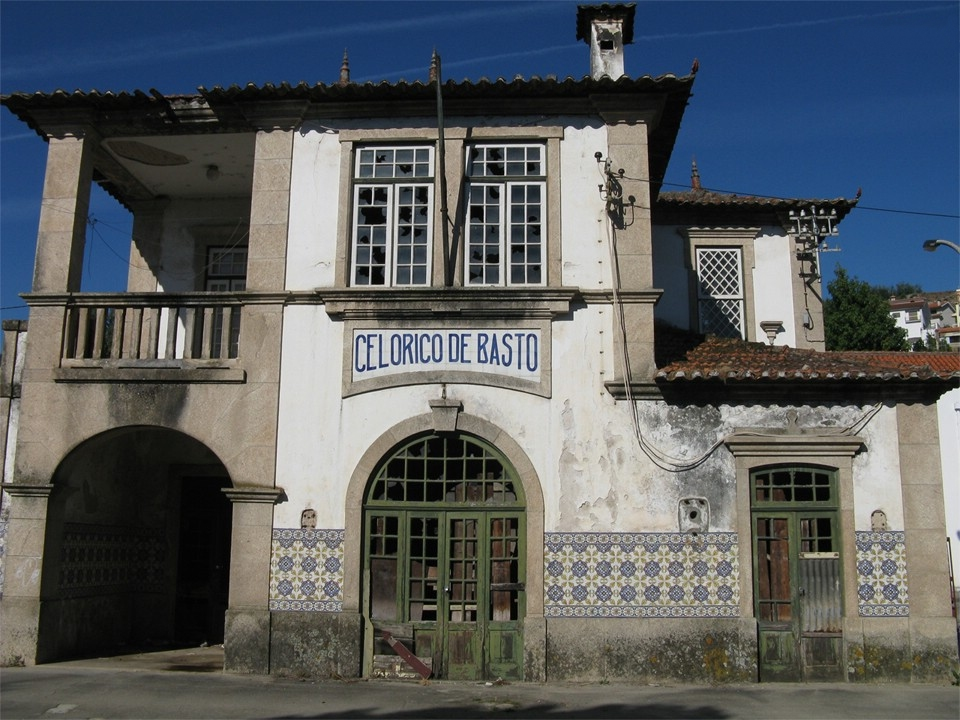 Nos anos 30 esta chegou a ser a estação terminal da linha do Tâmega. Hoje faz parte de muitas que tiveram o seu triste fim em 1990